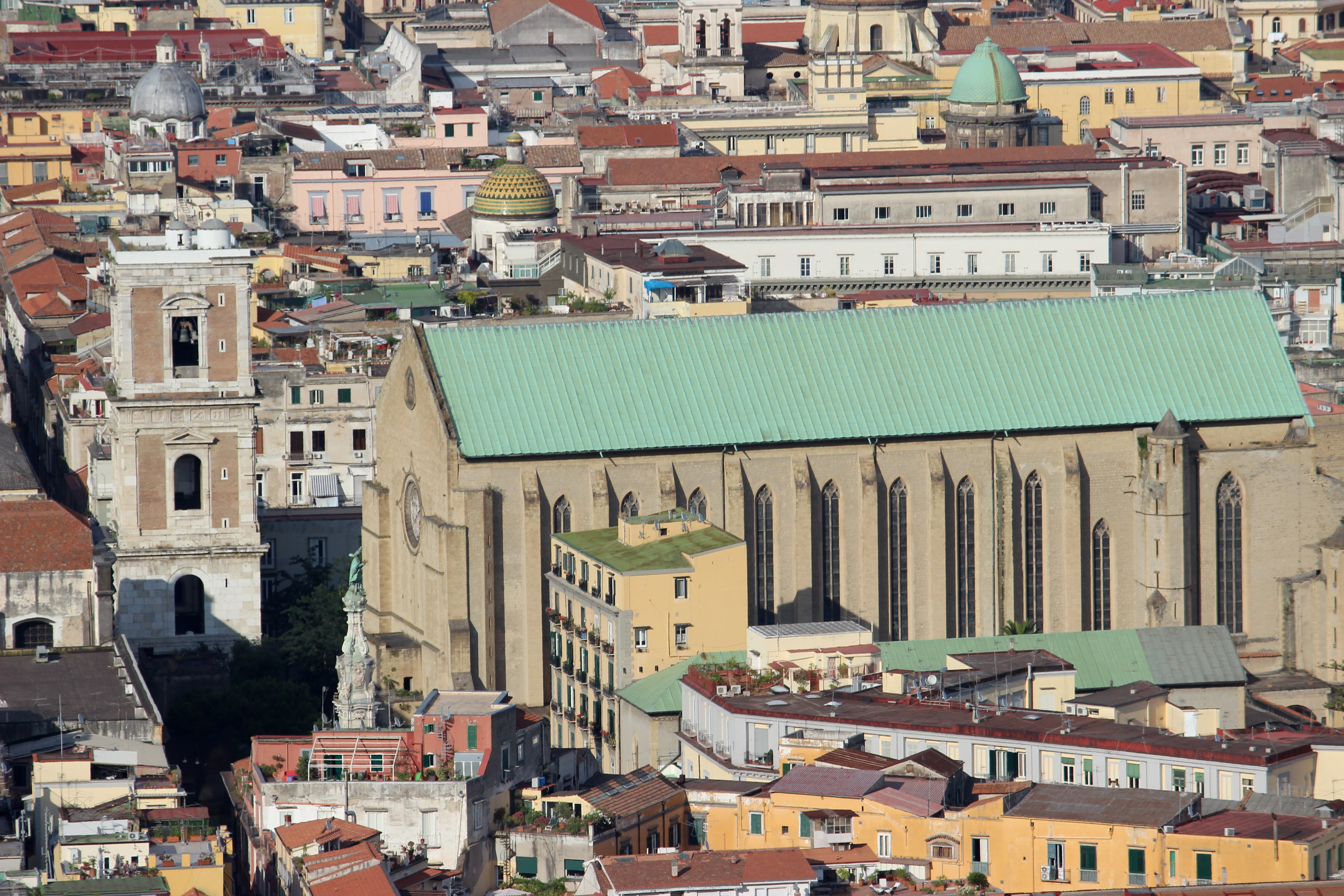 Nápoles, Santa Chiara vista desde la Certosa di San Martino.